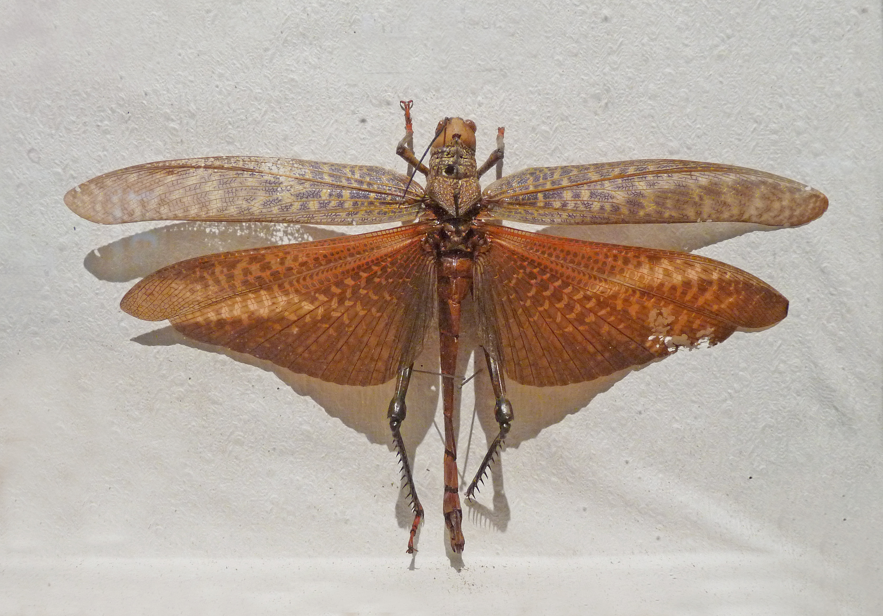 Tropidacris dux. Brésil. Musée d'histoire naturelle et d'ethnographie de Colmar